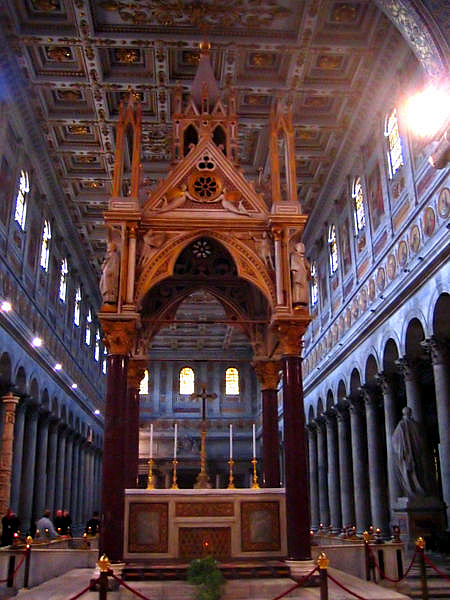 San Paolo Fuori le Mura, Roma, Italia